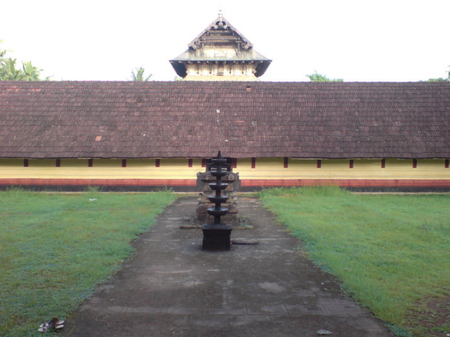 നെറുമ്പുര ക്ഷേത്രം-കിഴക്കേ നട